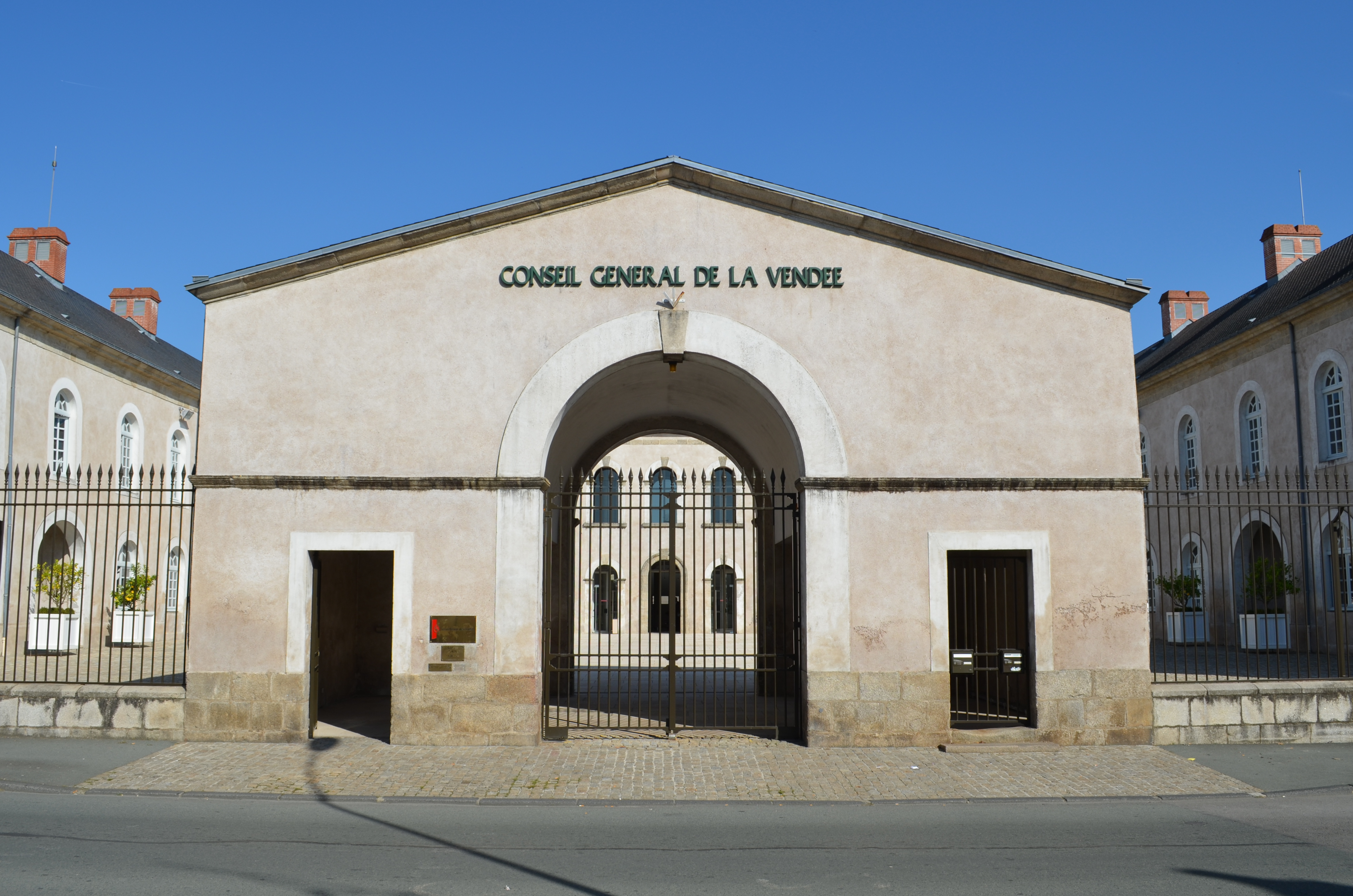 Ancien Hôpital (actuel Conseil Général de Vendée) - La Roche-sur-Yon .